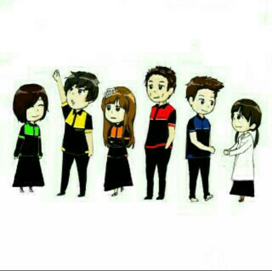 Jurusan SMK Negeri 1 Cikampek